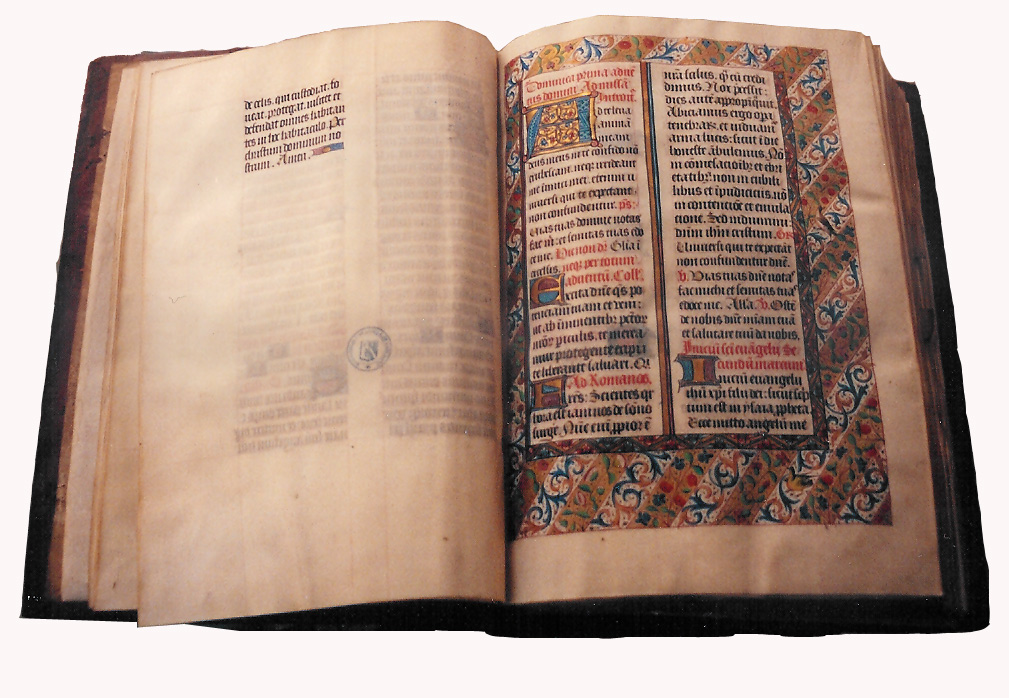 Photo d'un manuscrit lors d'une exposition sur Morimond à Chaumont en 1992